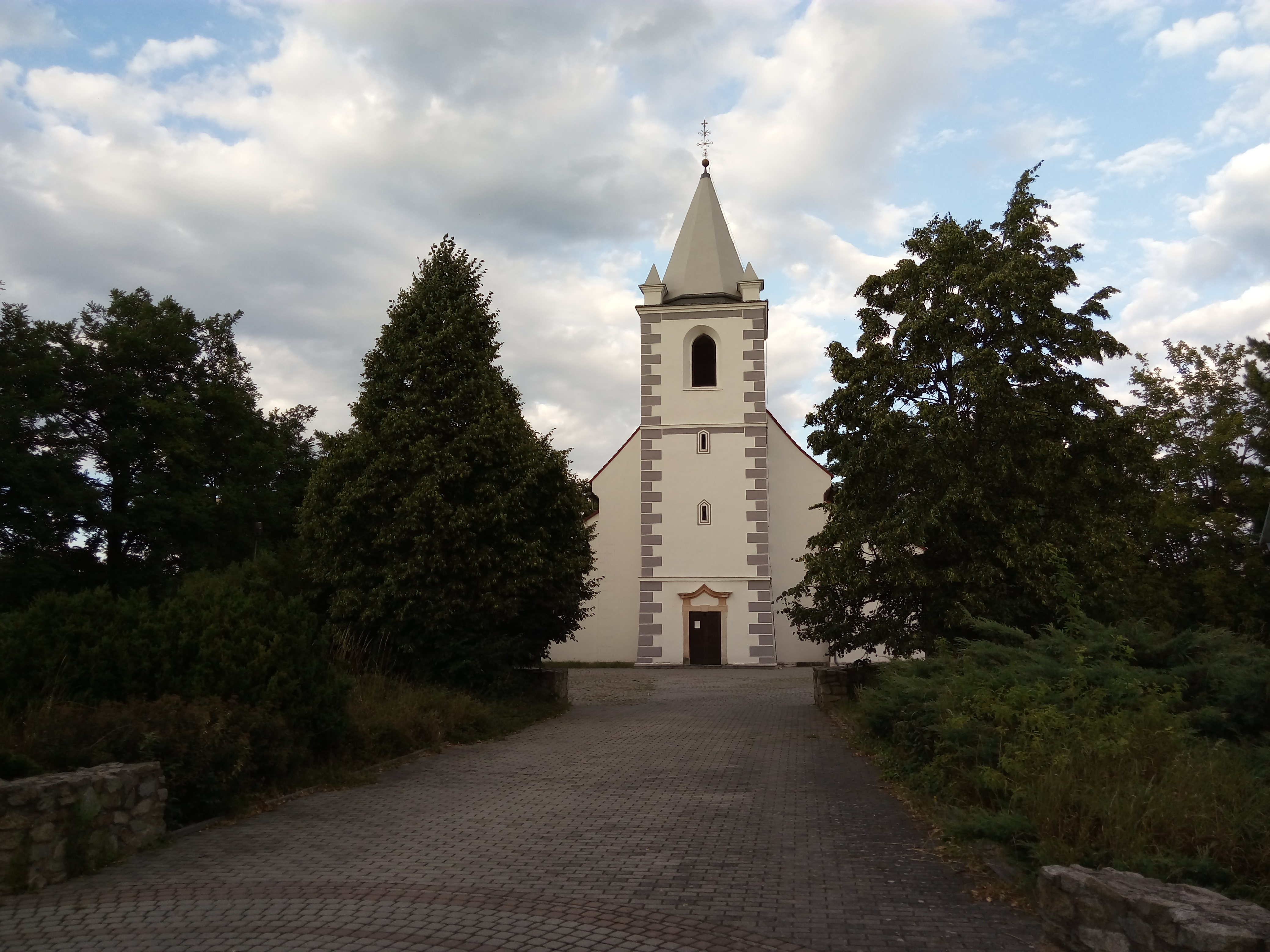 Kostol, Devínska Nová Ves, miestna časť Kostolné